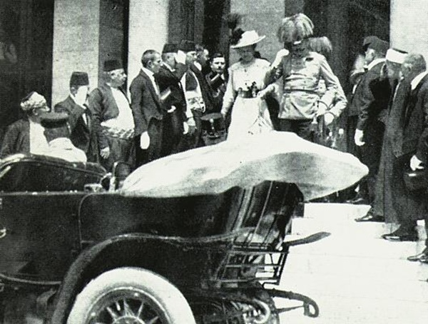 Francesco Ferdinando d'Asburgo-Este - Archiduque Francisco Fernando y su esposa la Princesa Sofía momentos antes de ser asesinados.